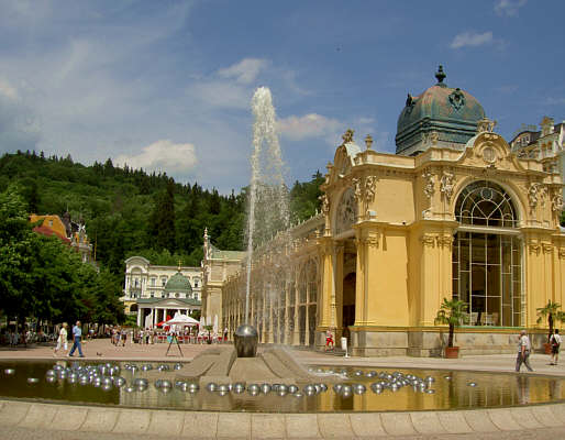 Gusseiserne Kolonnade in Marienbad aus dem Jahr 1889 mit singendem Brunnen bzw. singender Fontäne